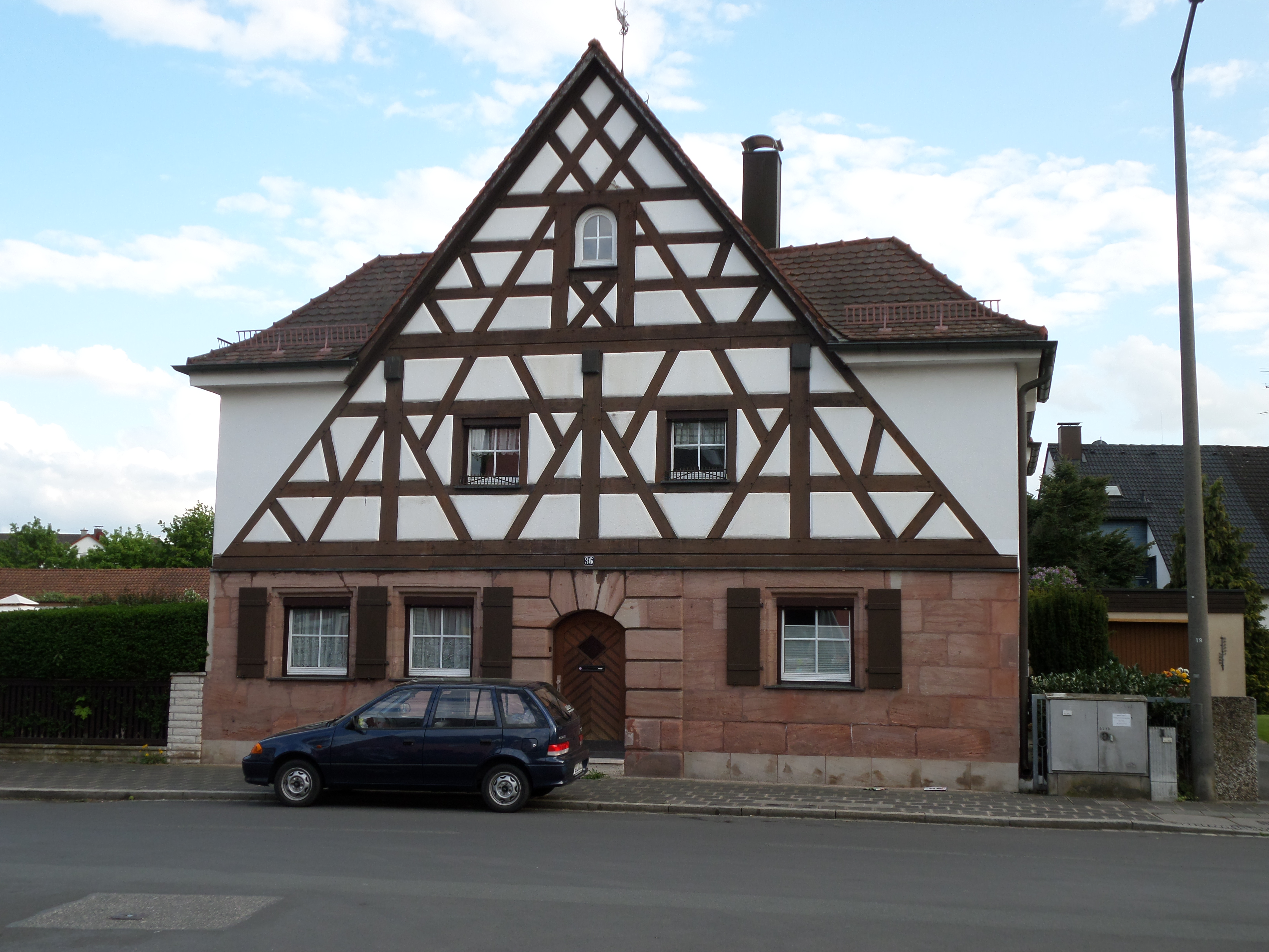 Moritzbergstraße 36 - Ehemaliges Bauernhaus - Erdgeschossiger, giebelständiger Steilsatteldachbau mit Sandsteinfassade, profiliertem Segmentbogenportal und Fachwerkgiebel, im Kern 17. Jahrhundert, durch Anbauten des 20. Jahrhunderts verändert. - D-5-64-000-1360